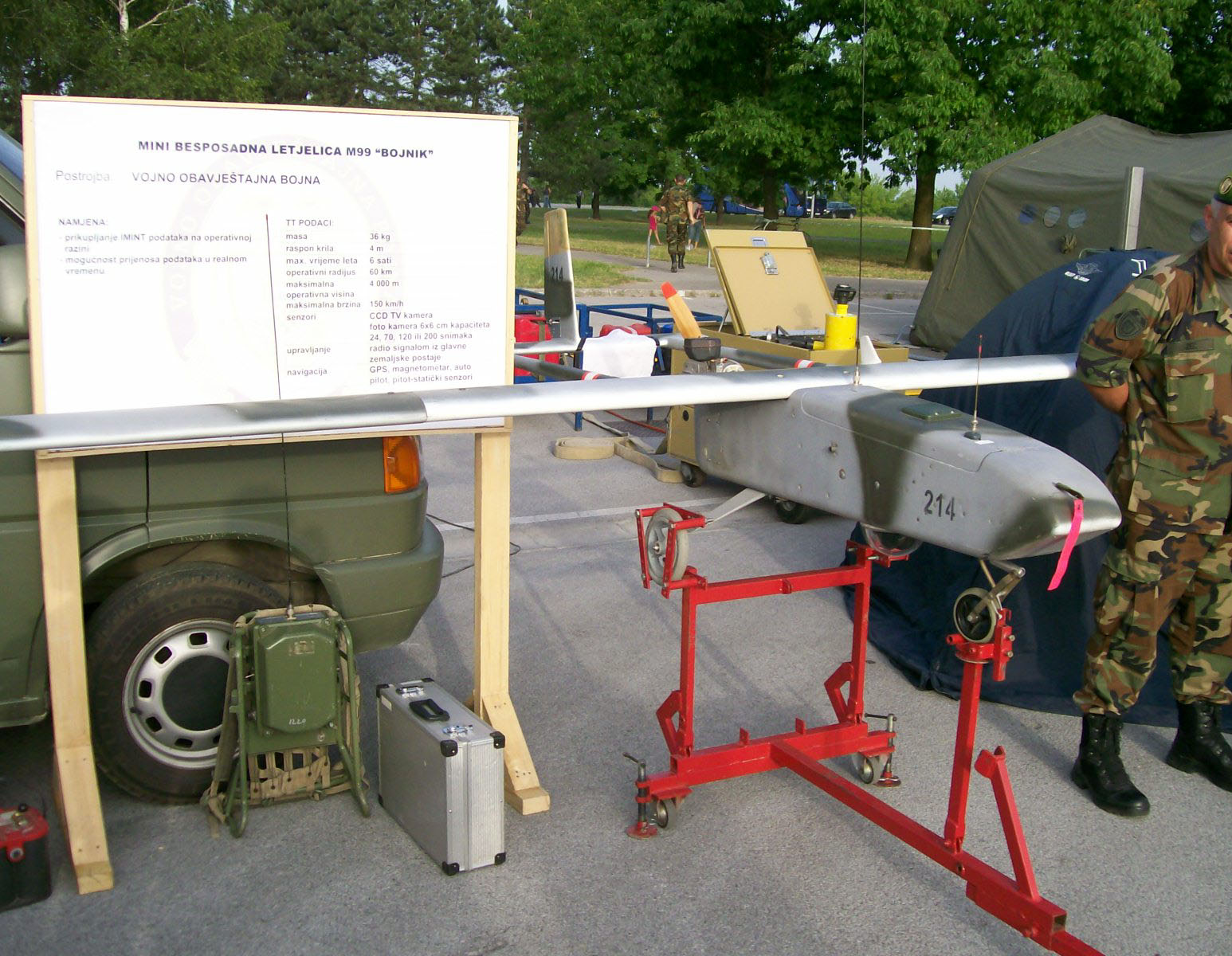 Mini besposadna letjelica M99 Bojnik